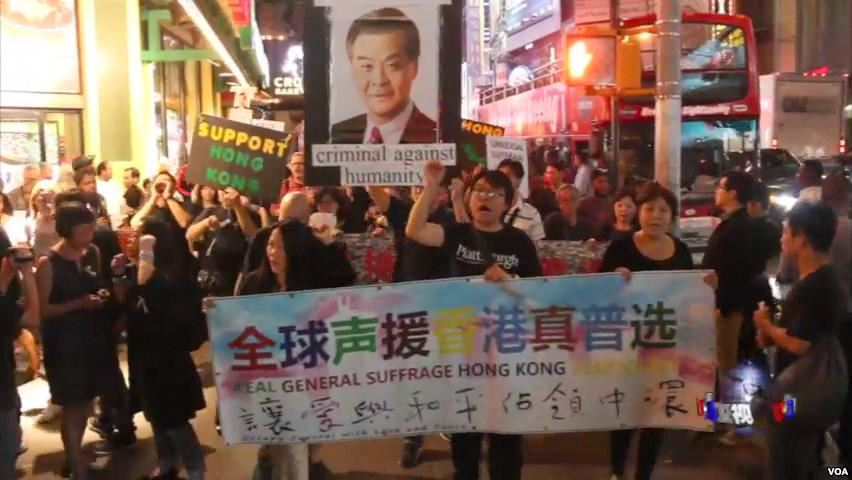 兩百多紐約香港人遊行聲援佔中